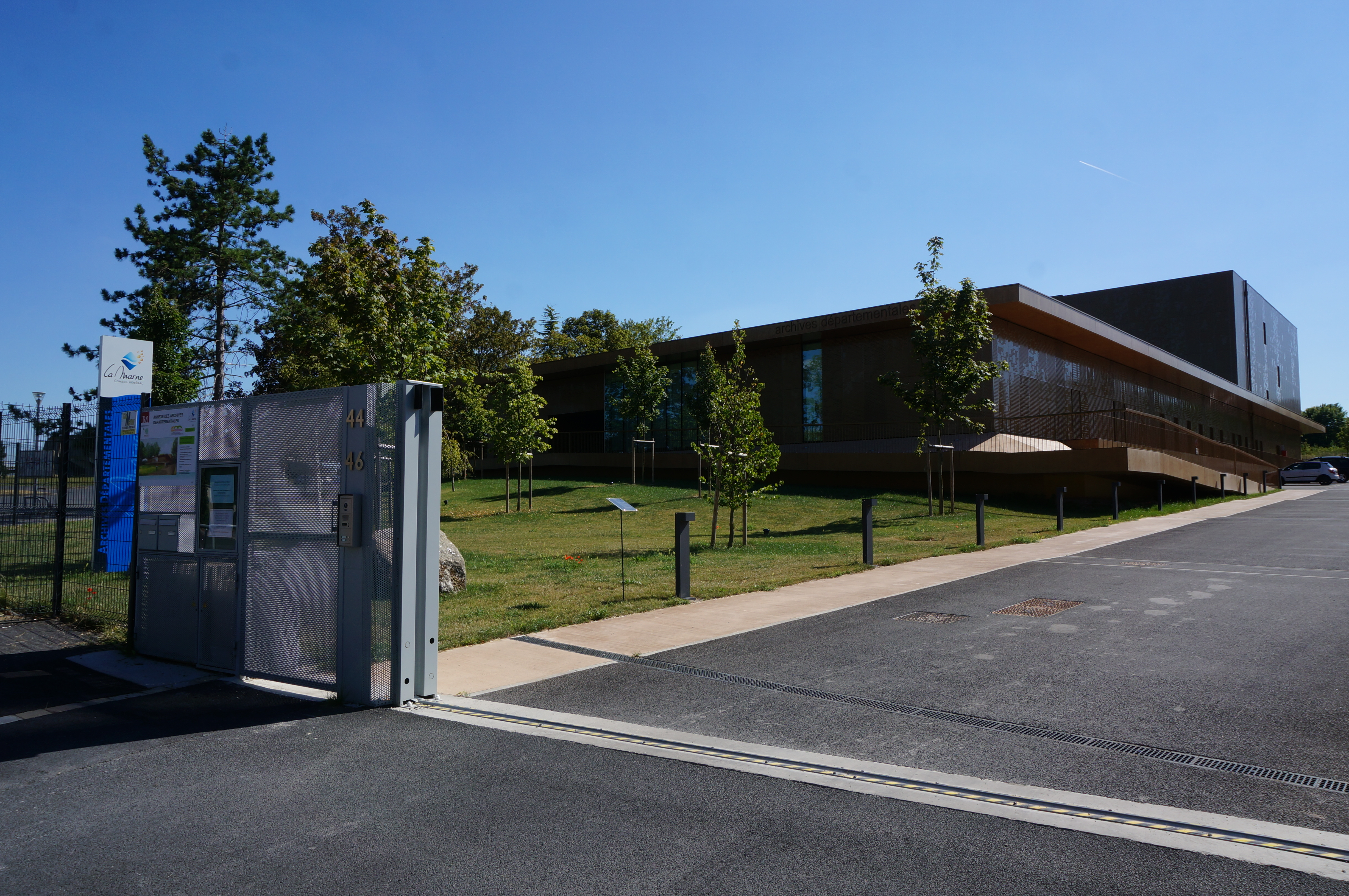 devant les Archives départementales de la Marne, site de Reims.